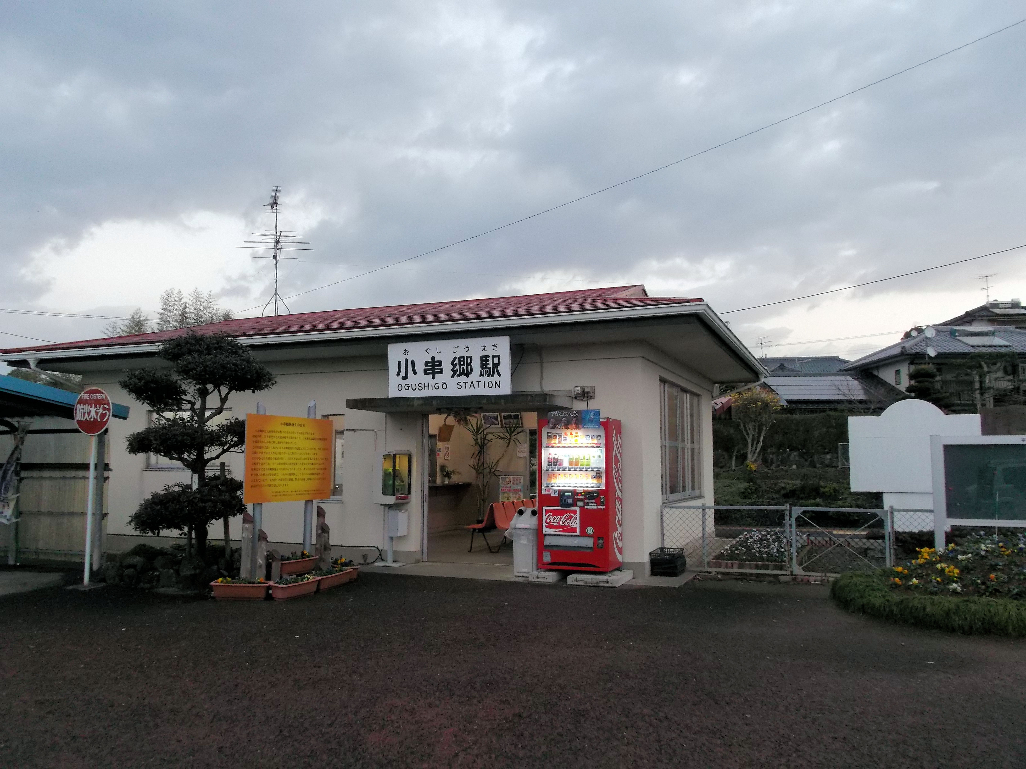 JR九州大村線小串郷駅